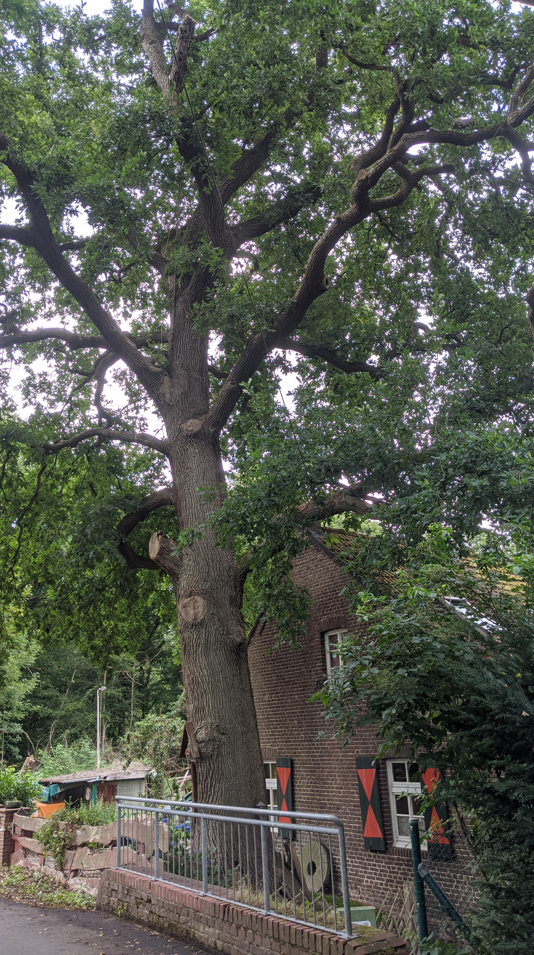 Stieleiche vor der Flootsmühle bei Wachtendonk Denkmalnummer ND 32 Blick von der Brücke über die Nette